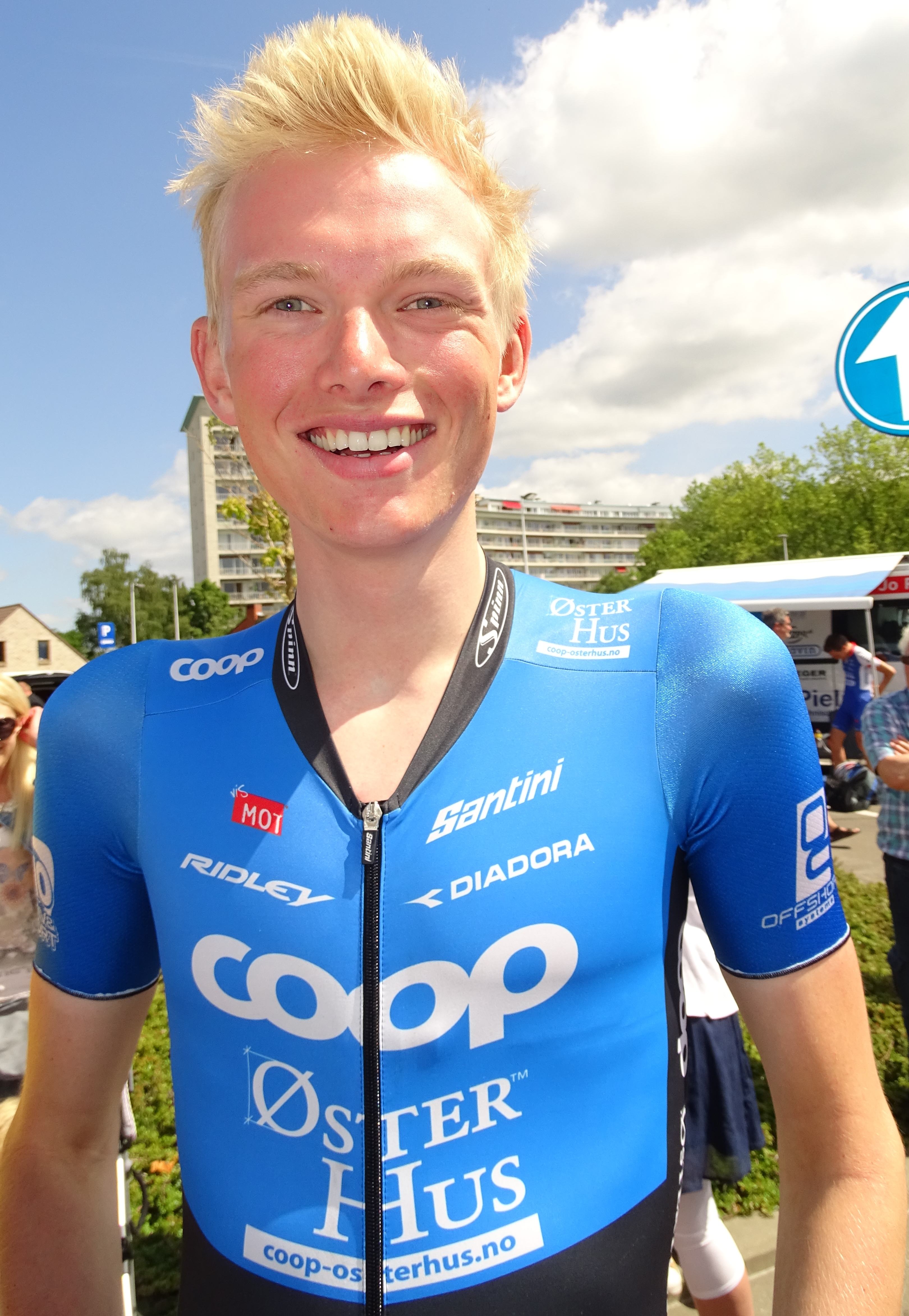 Reportage réalisé le dimanche 7 juin à l'occasion du départ du Mémorial Philippe Van Coningsloo 2015 à Wavre, Belgique.